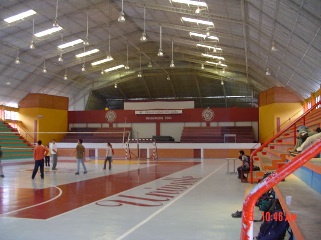 Coliseo Universidad del Valle